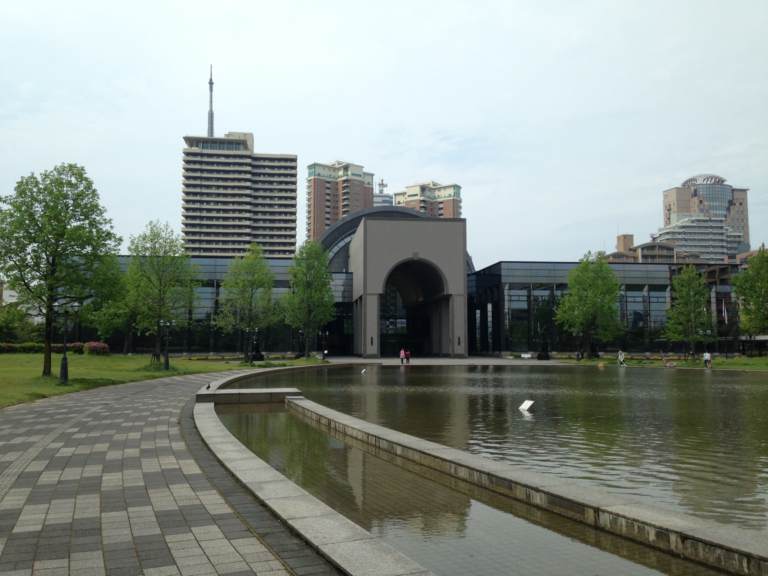 福岡市博物館の遠景